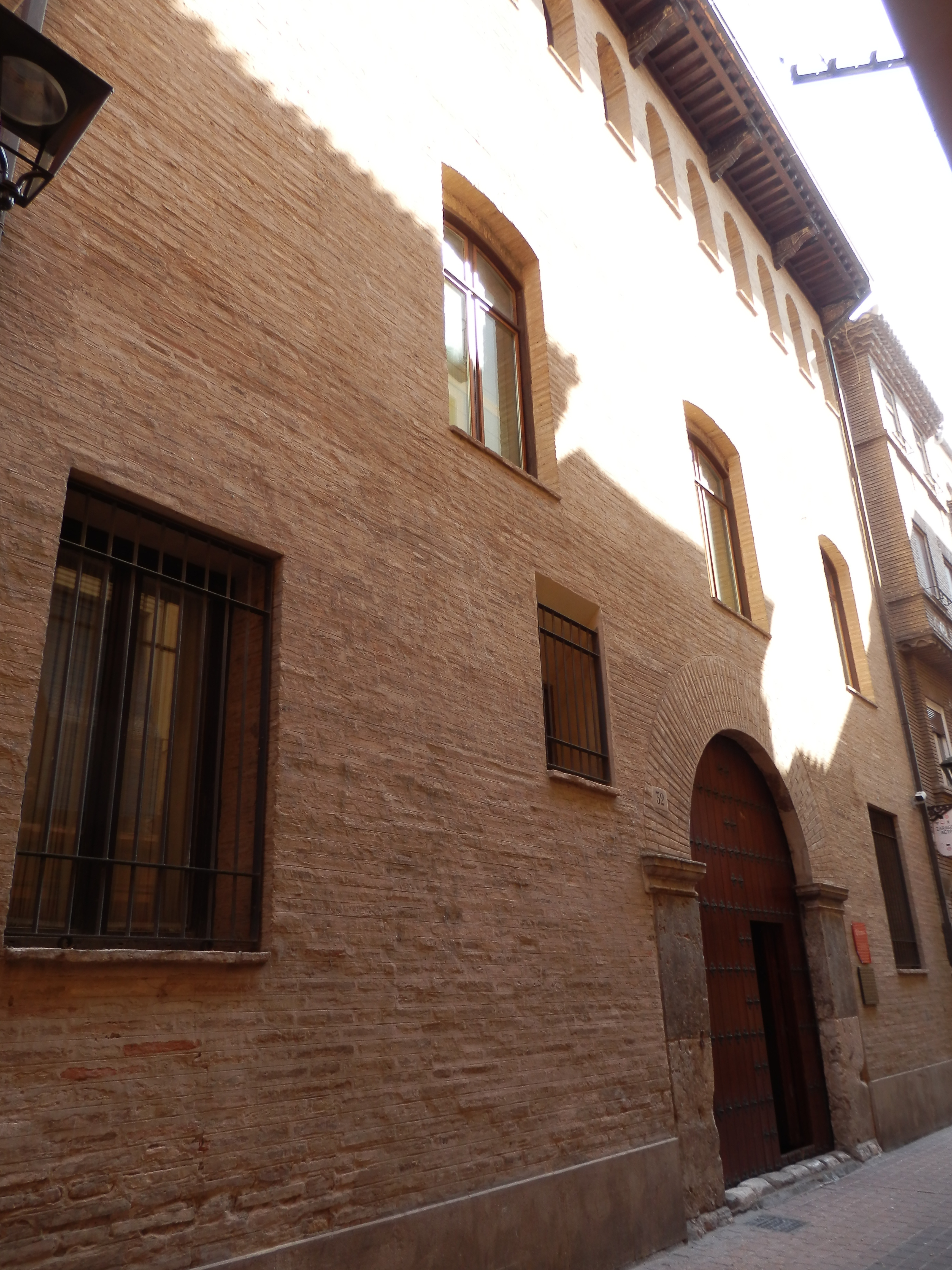 Edificio situado en la calle Armas, 32, de Zaragoza, España. Es bien de interés cultural (BIC) de la provincia de Zaragoza.